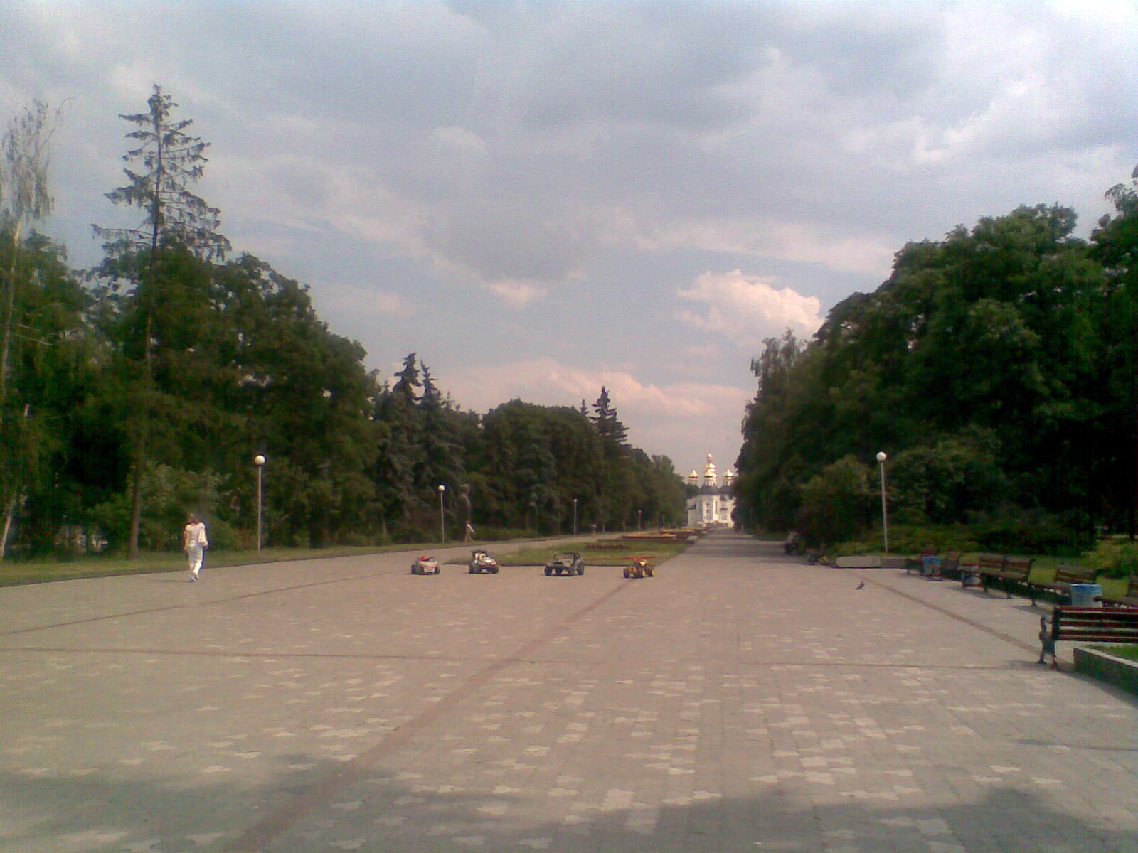 Чернигов. Аллея Героев.